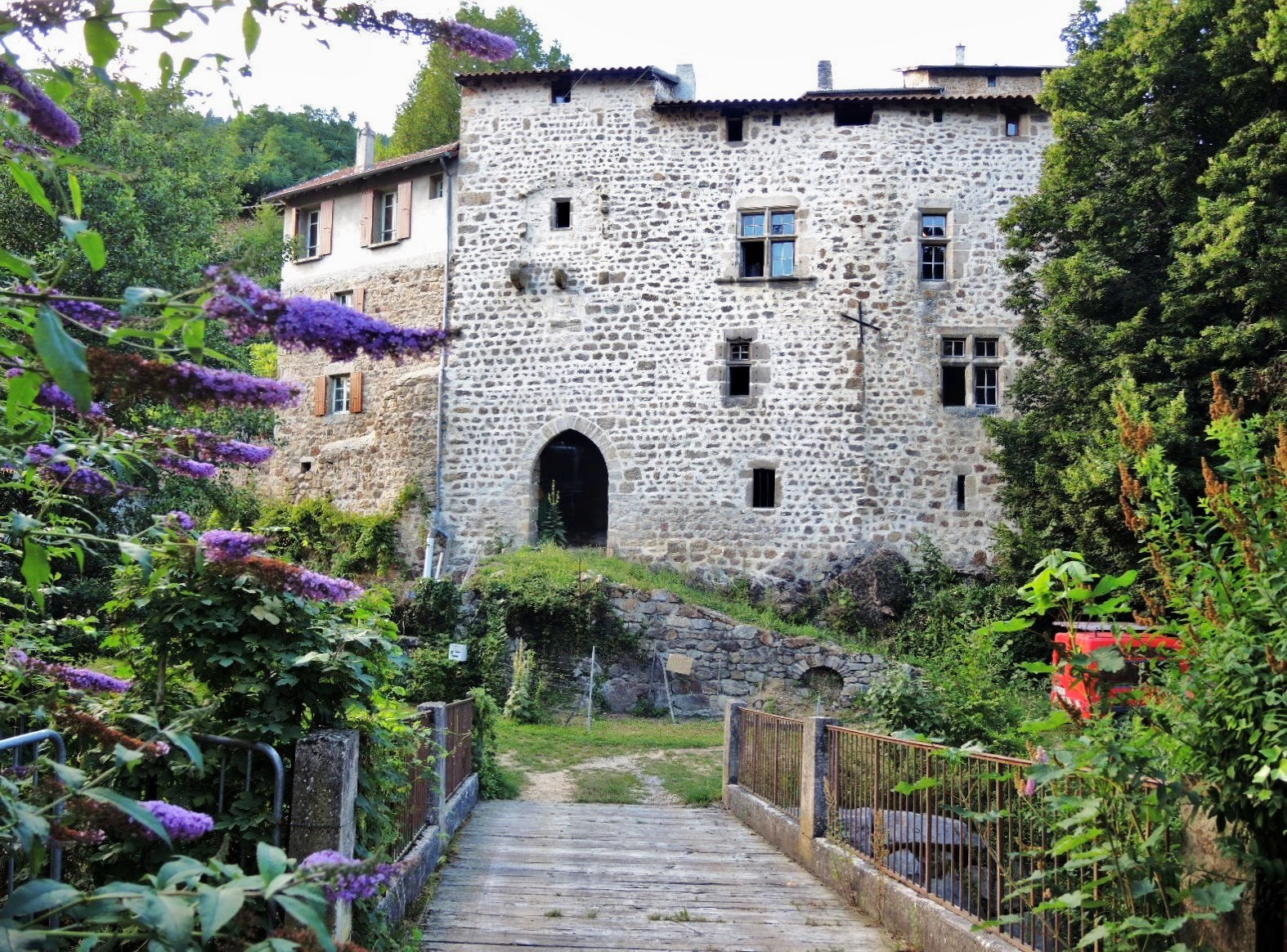 Vocance château entrée